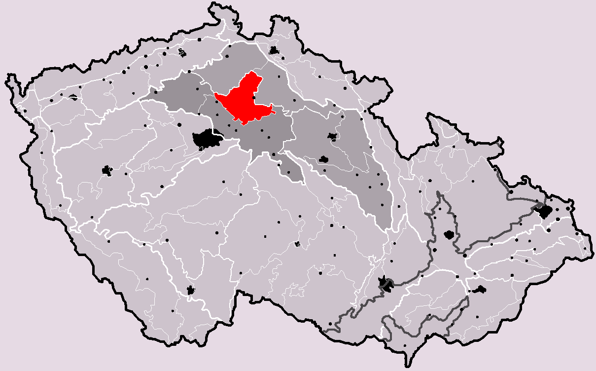 Poloha geomorfologického celku Jizerská tabule v rámci České republiky. Hercynský systém Hercynská pohoří I Česká vysočina I6 (VI) Česká tabule I6B (VIB) Středočeská tabule I6B-2 (VIB-2) Jizerská tabule